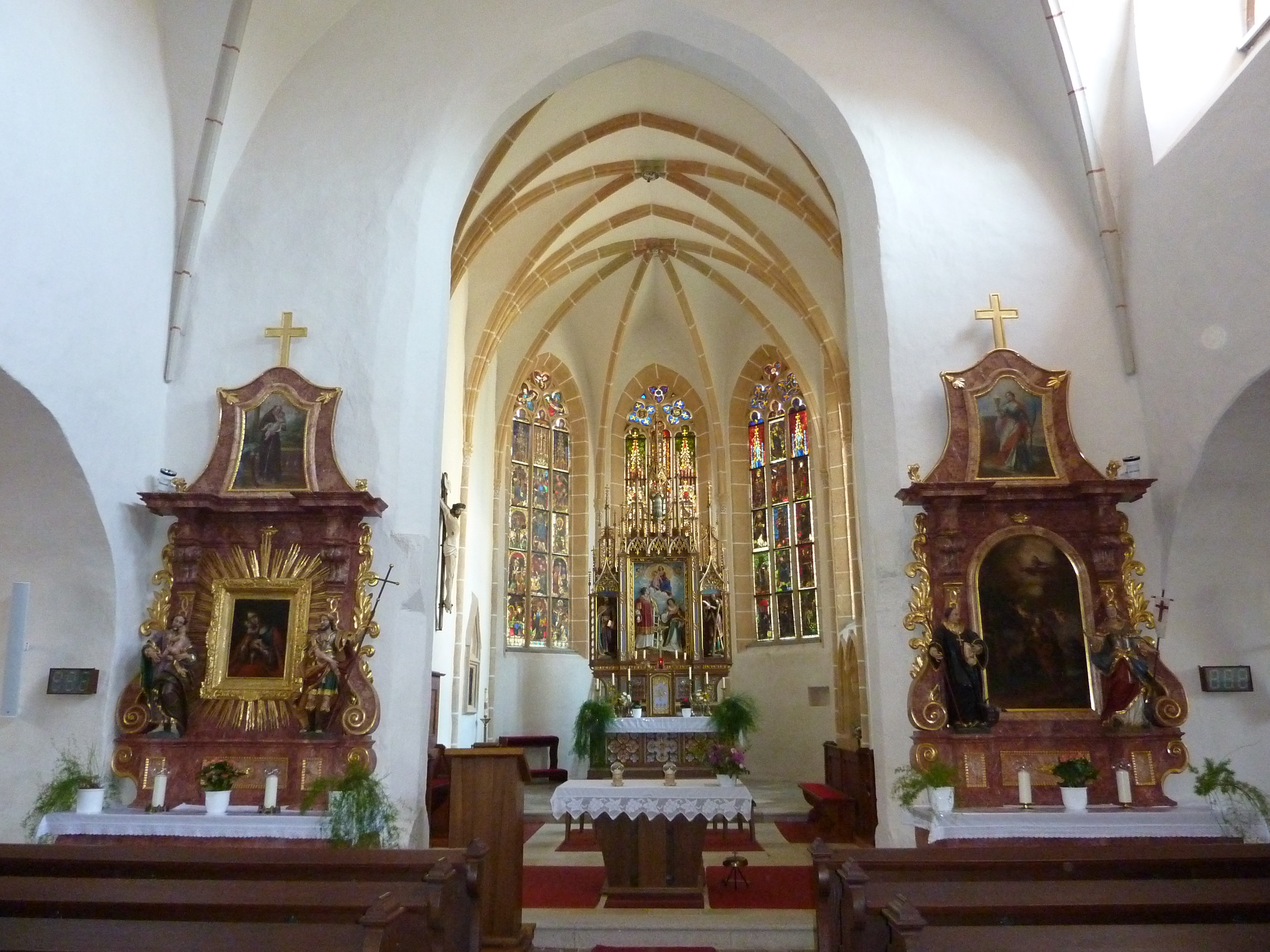 Pfarrkirche hl. Laurentius in Friedersbach, Zwettl, Niederösterreich